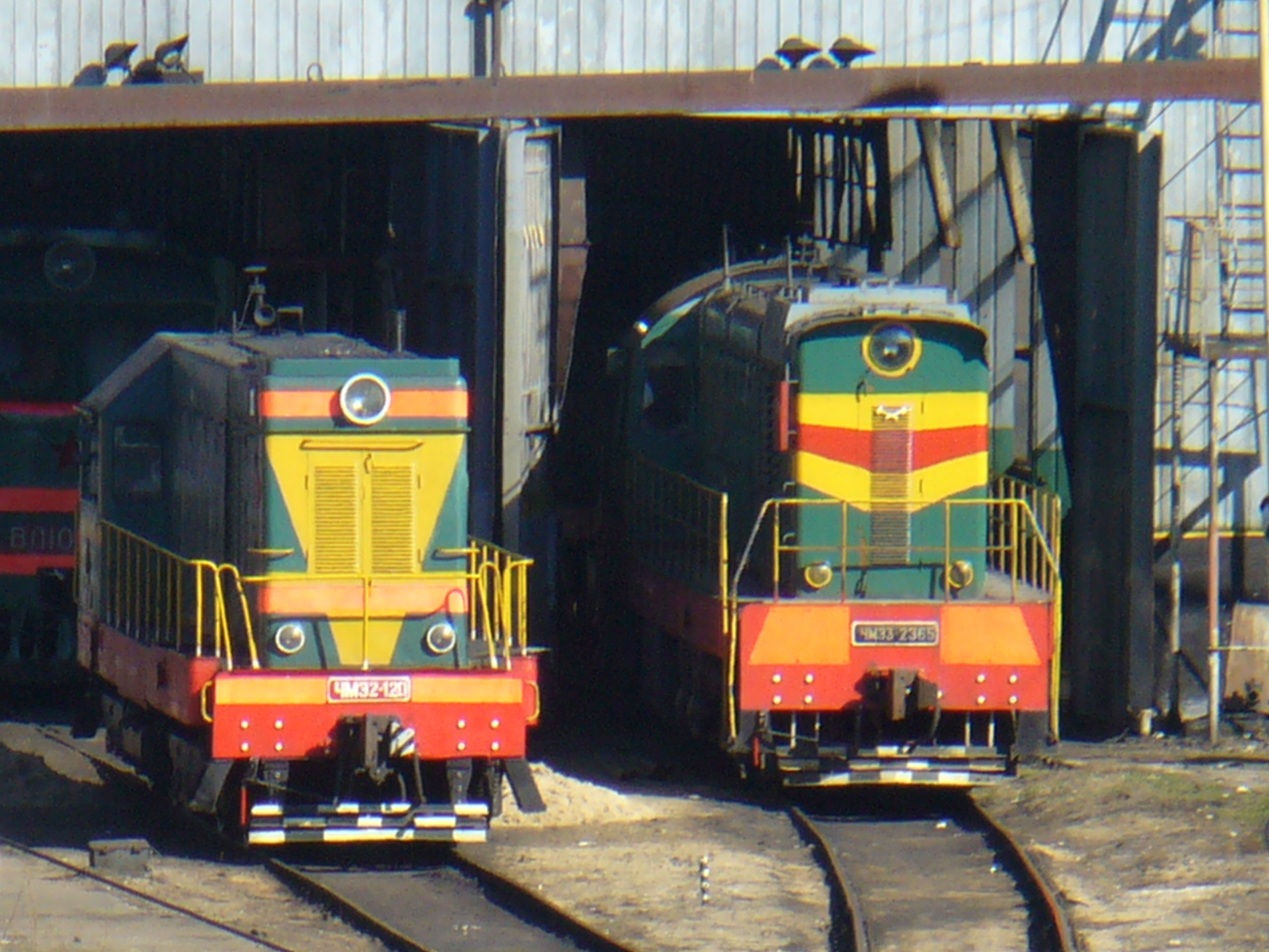 ЧМЭ2-120 Подмосковная ChME2-120_20060420_054